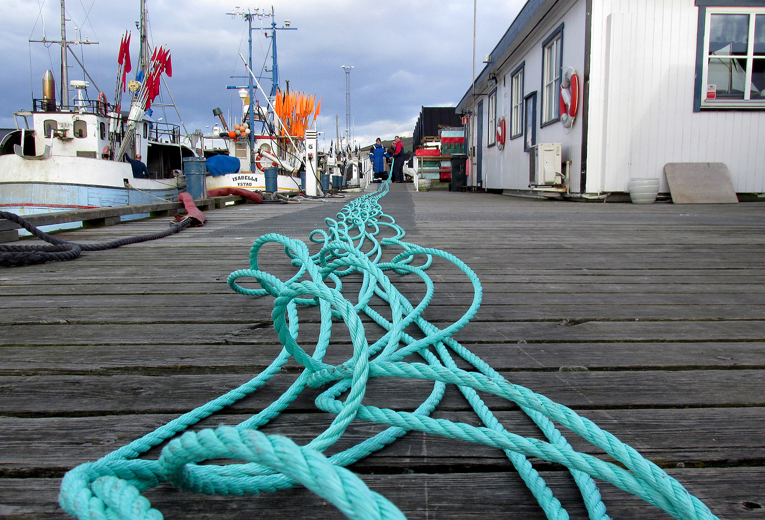 Tågvirke dras ut till en ryssja. Ystads småbåtshamn 18 mars 2016.